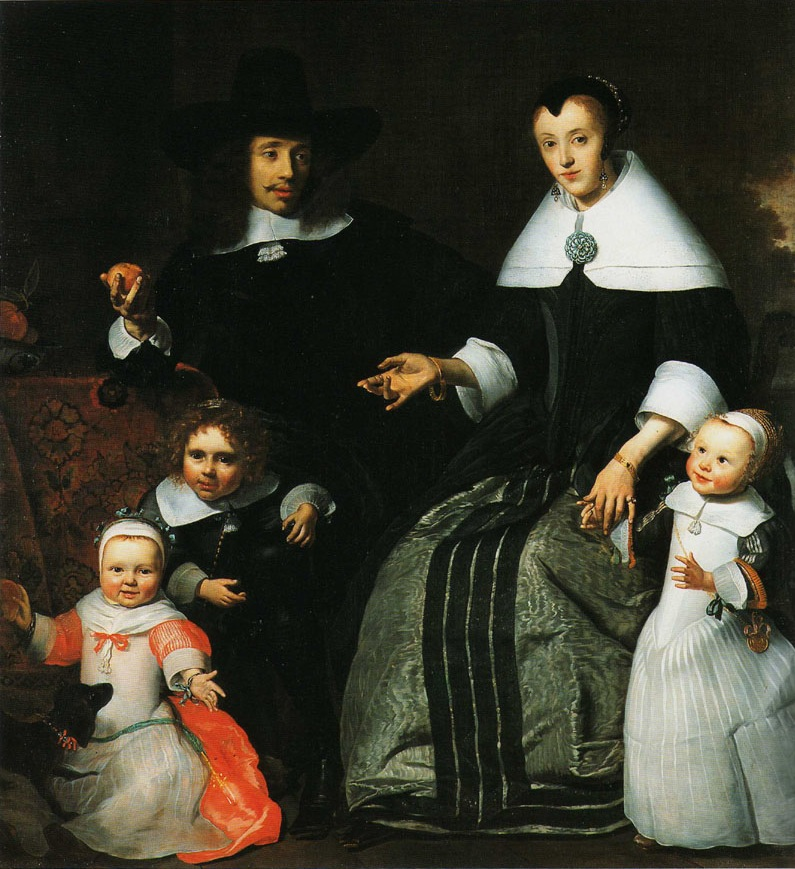 Portrait sans doute posthume de la mère. Tâche vermillon de la robe du jeune garçon (à gauche). Jeu des regards et des mains.